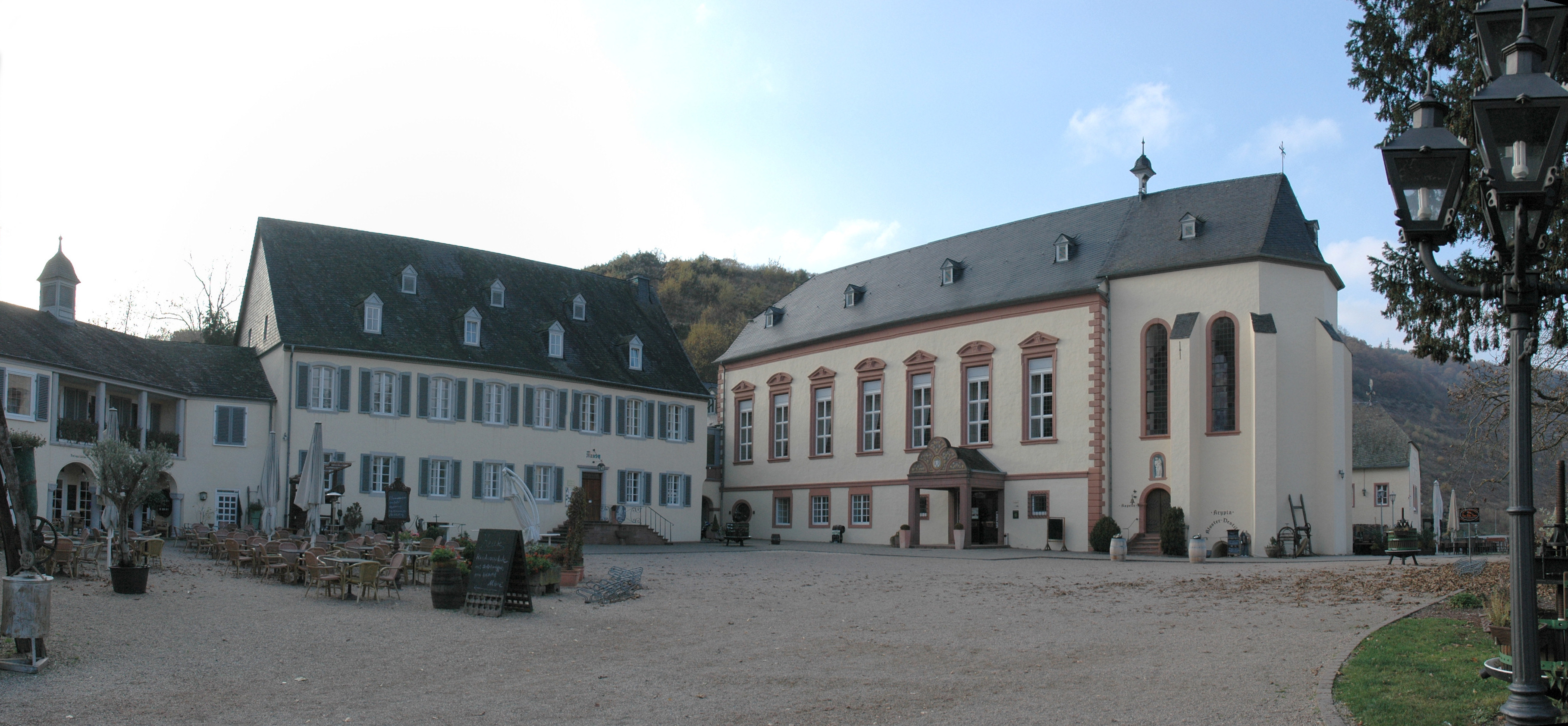 Kloster Machern in Bernkastel-Kues This image was created with Hugin